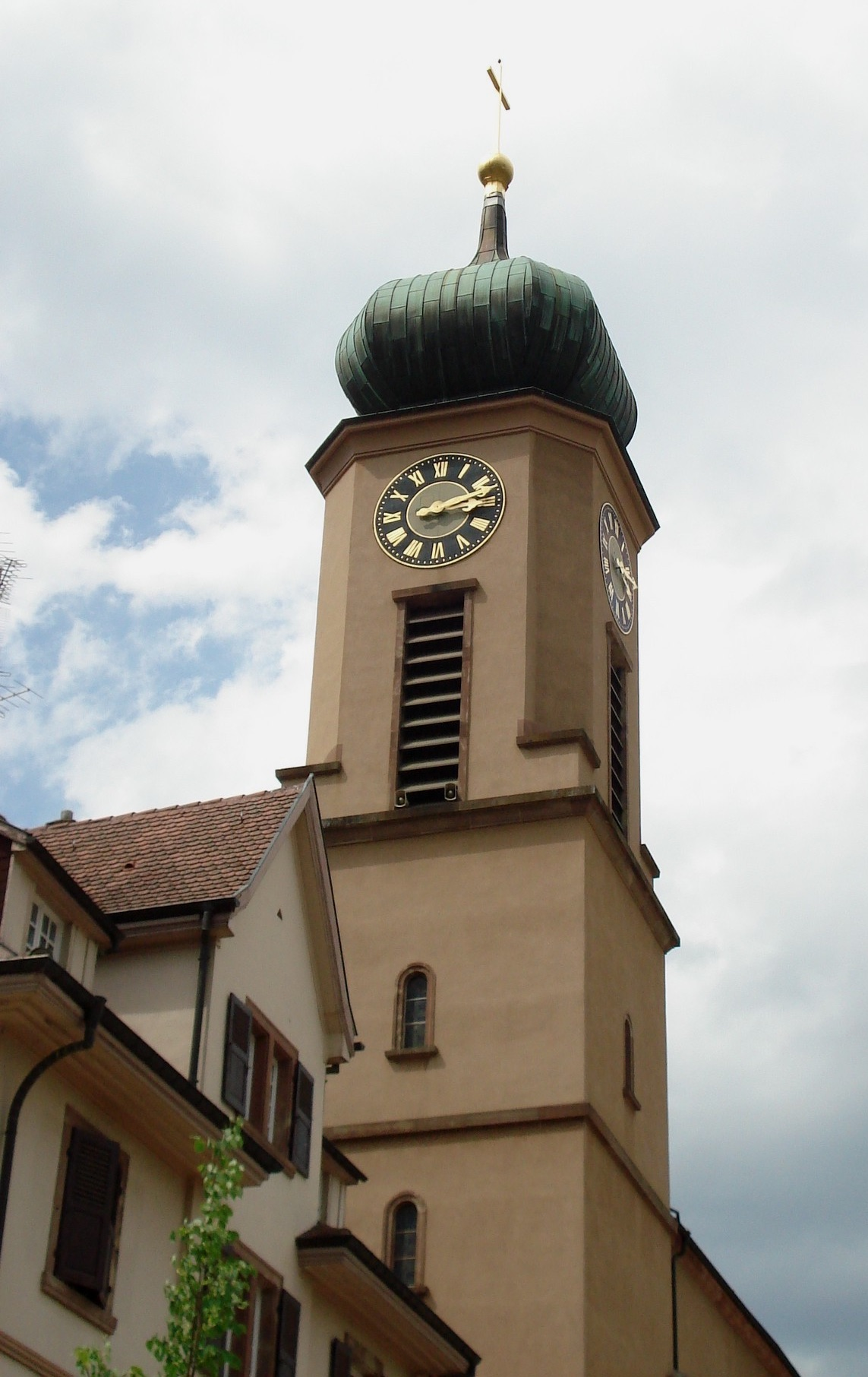 Thierenbach : clocher à bulbe baroque